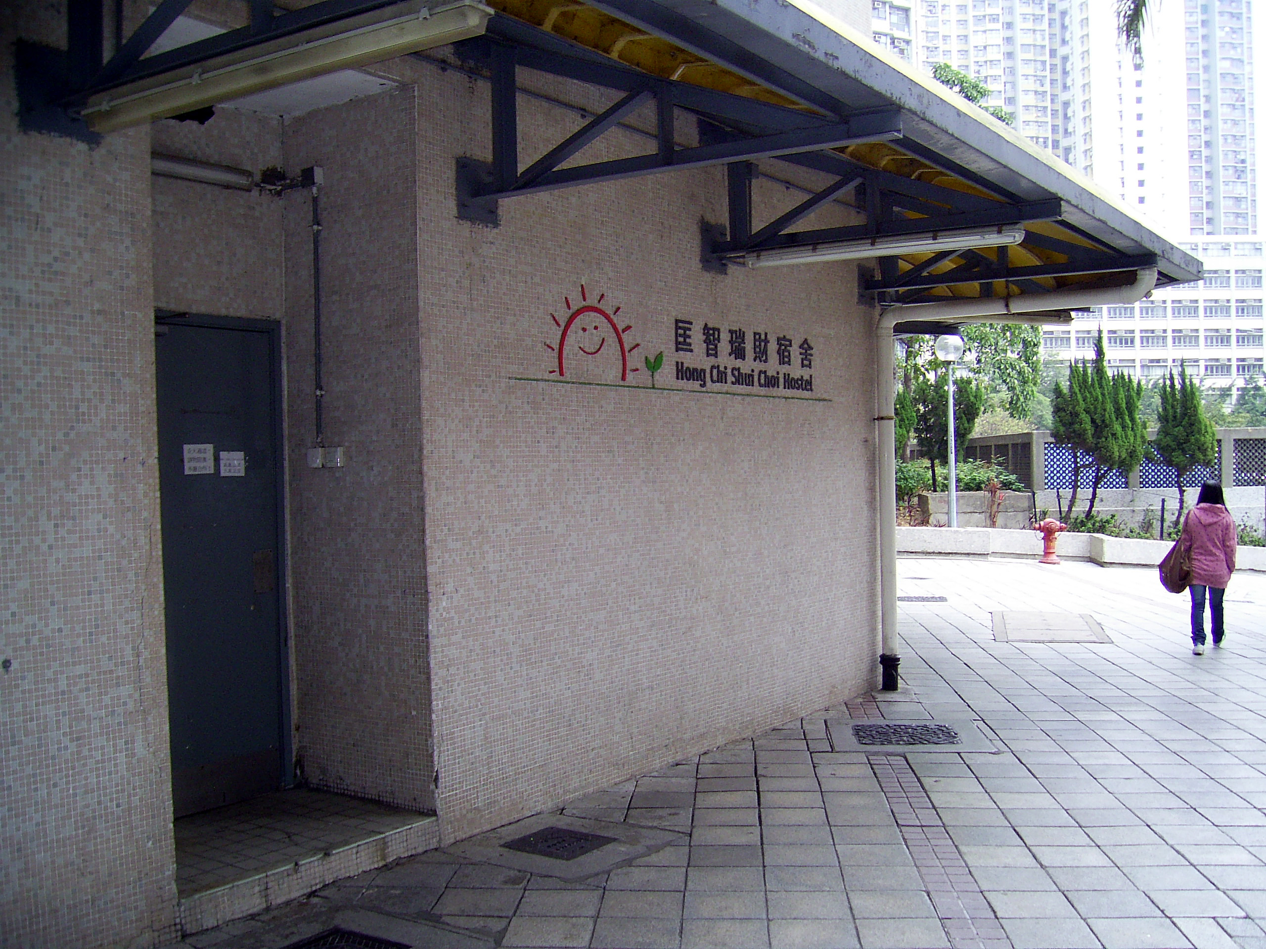 中文（香港）: 匡智瑞財宿舍